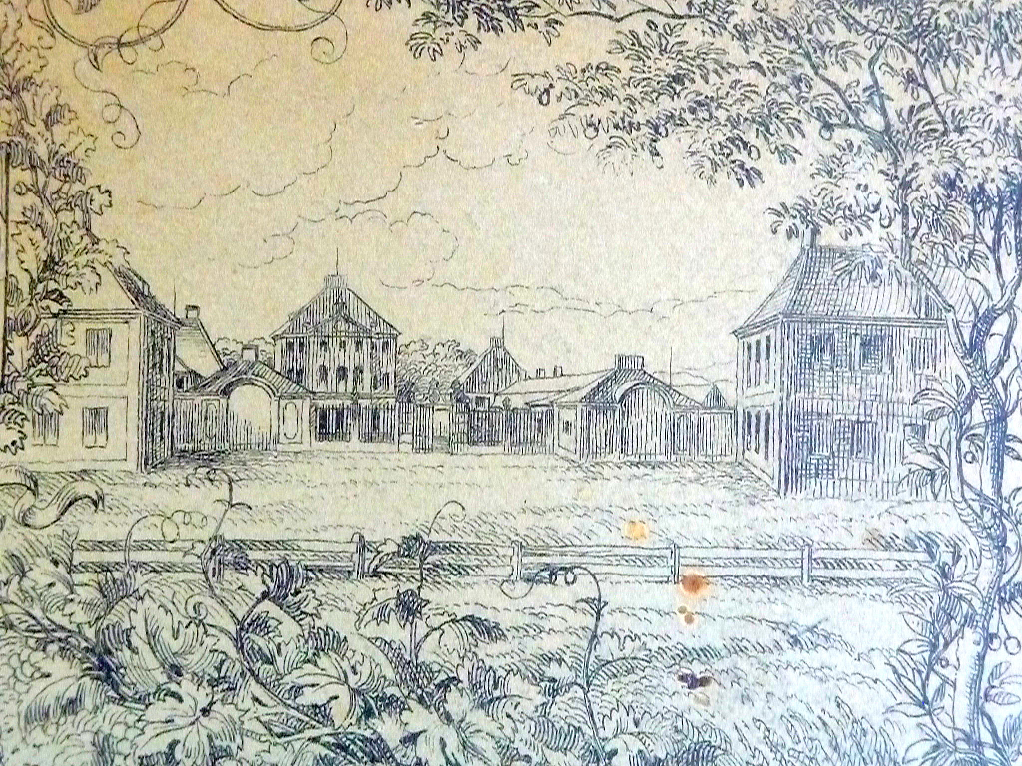 Ansicht von Schloss Fürstenried um 1820. Damals beherbergte die angegliederte Schwaige als landwirtschaftlicher Musterbetrieb eine neue Tierrasse: Merinoschafe.